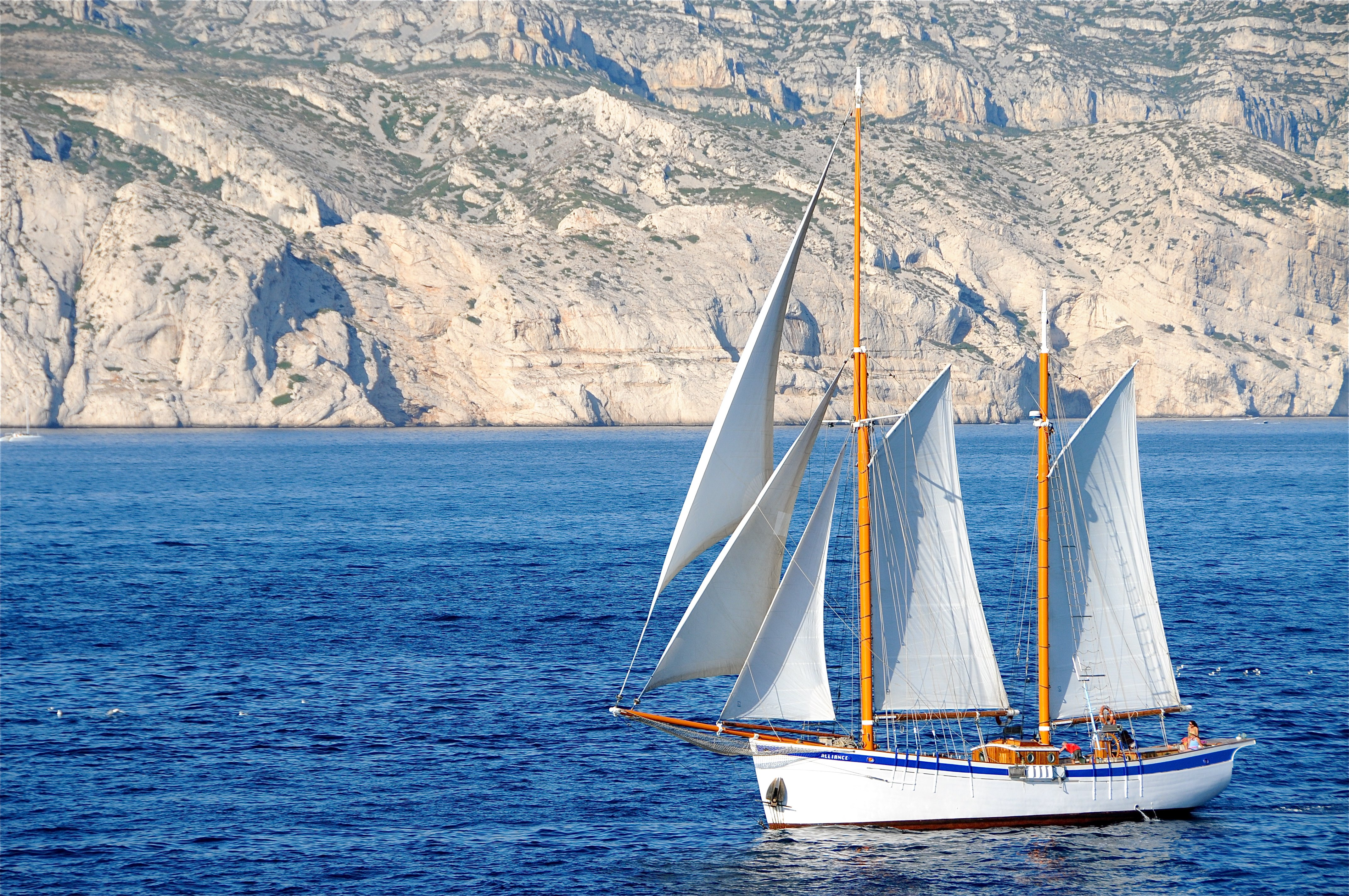 Alliance dans les calanques de Marseille